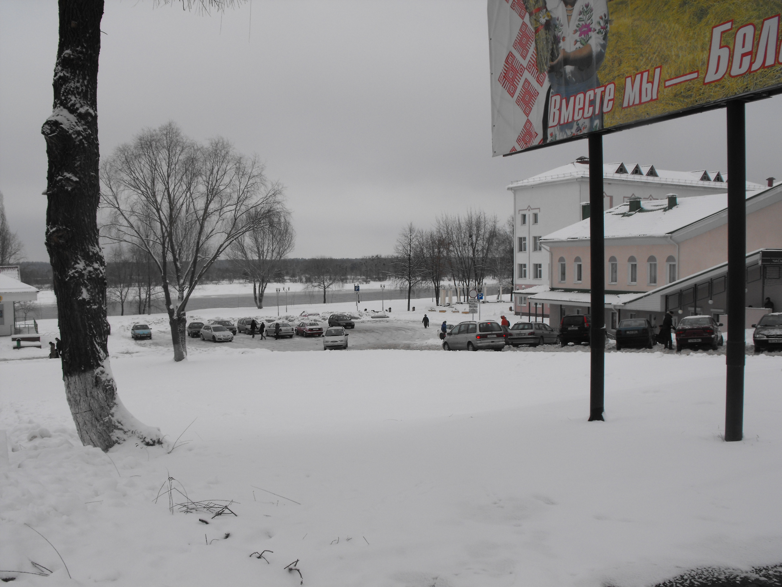 Вид на берег реки Припять, где гитлеровцы неоднократно массово топили евреев.